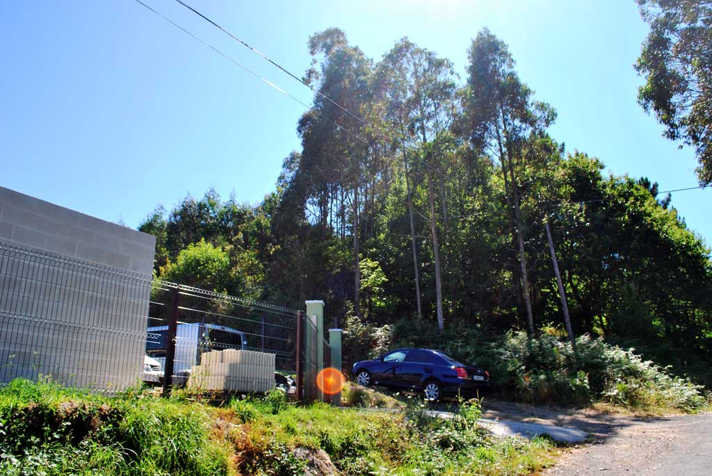 Castro da Pedreira no Val, Narón.